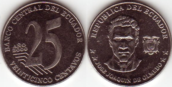 Ecuadorian 25 Centavos coin